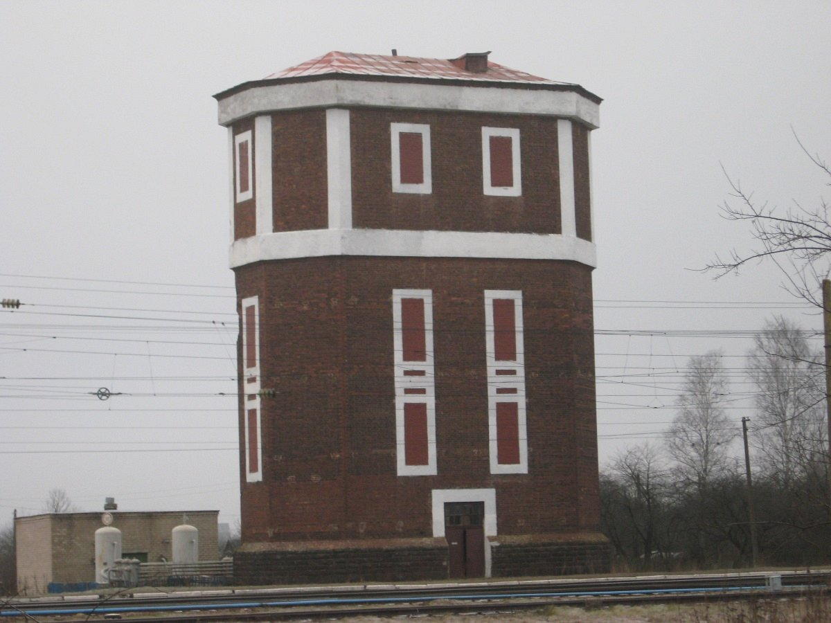 Прыяміна. Вадацяжная вежа